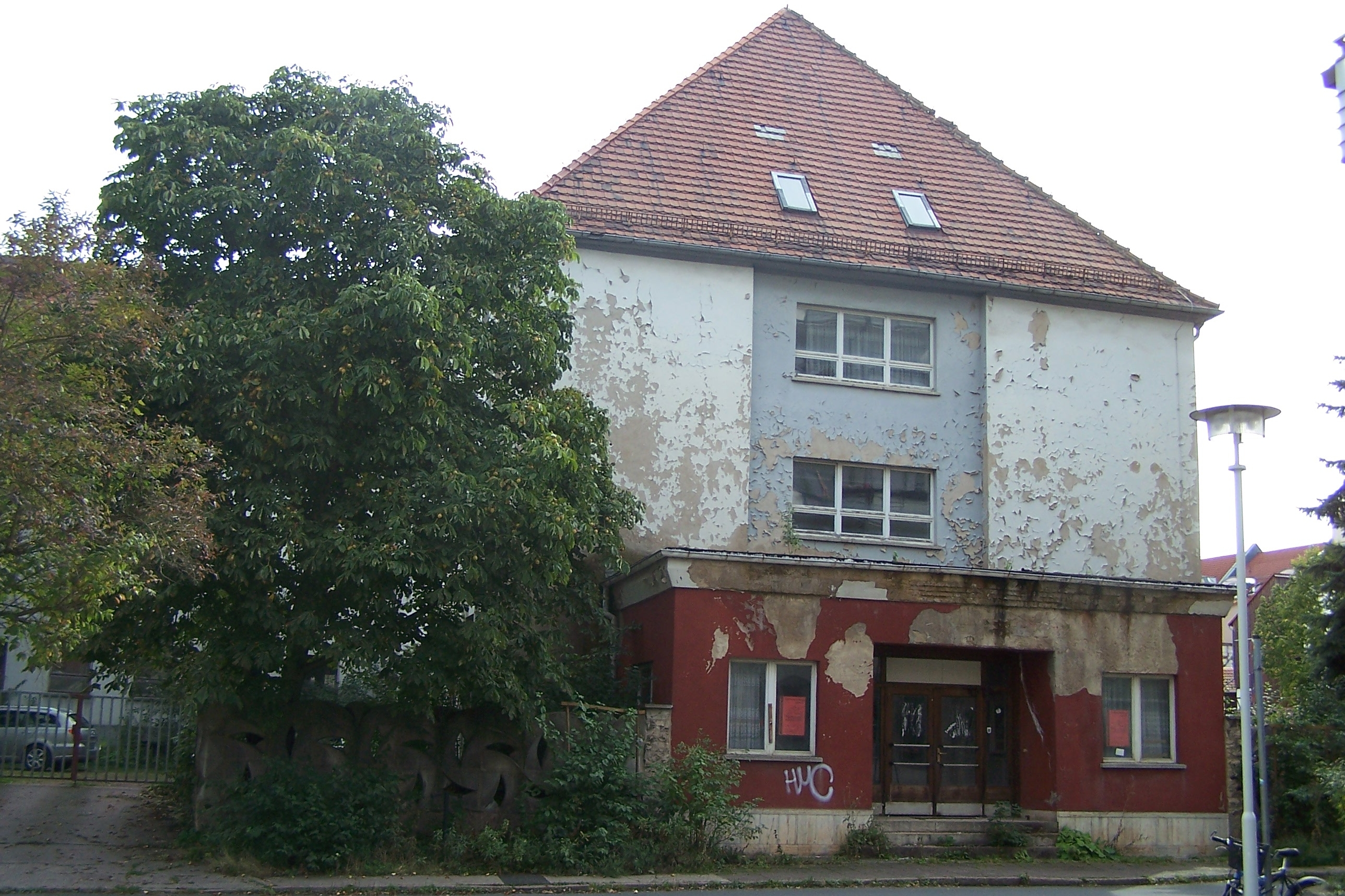 Zum ehemaligen Kriminalgericht in Eisenach gehöriges Gebäude - in der DDR-Zeit Sitz des Kombinates Fahrzeugelektrik Ruhla - jetzt eine dem Verfall preisgegebene Immobilie.